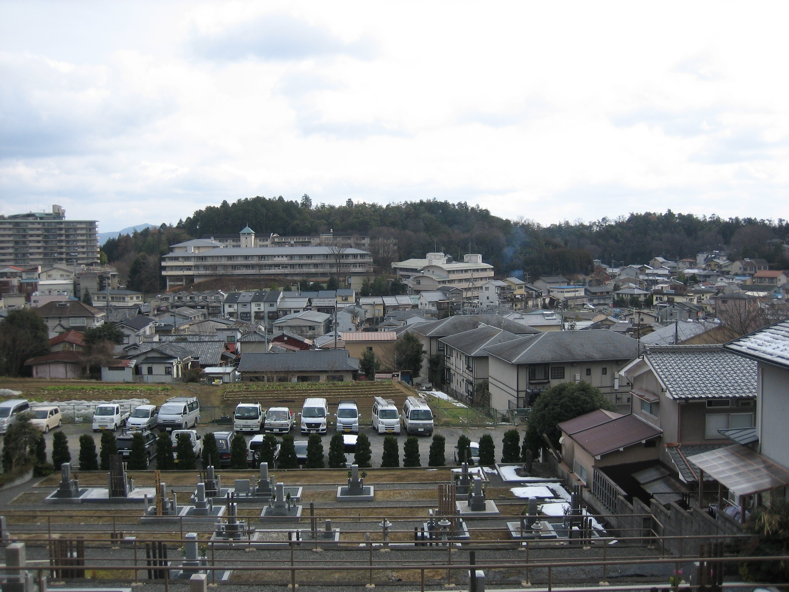 京都市北区大北山原谷乾町から撮影